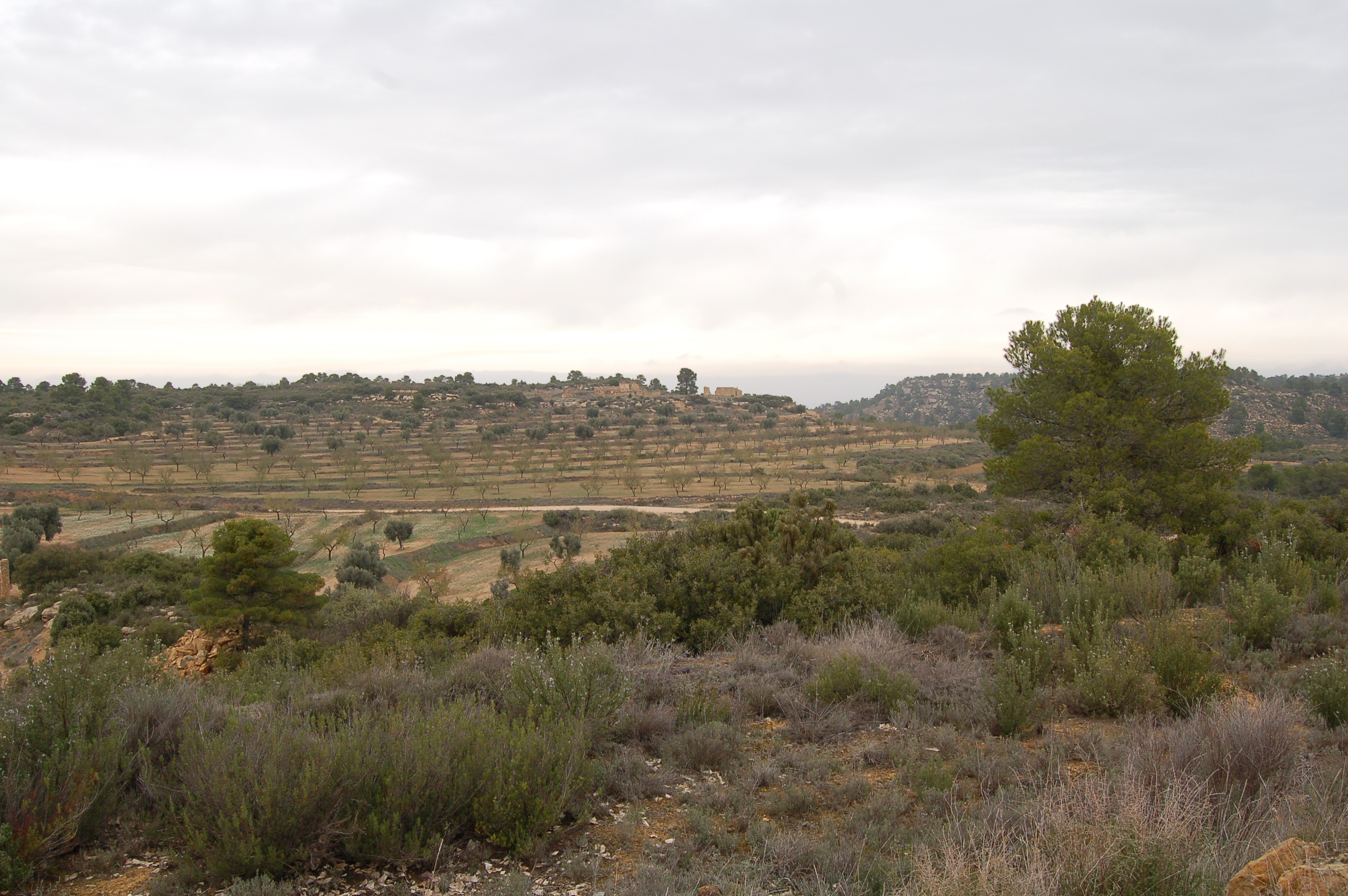 Camp de batalla de Maella